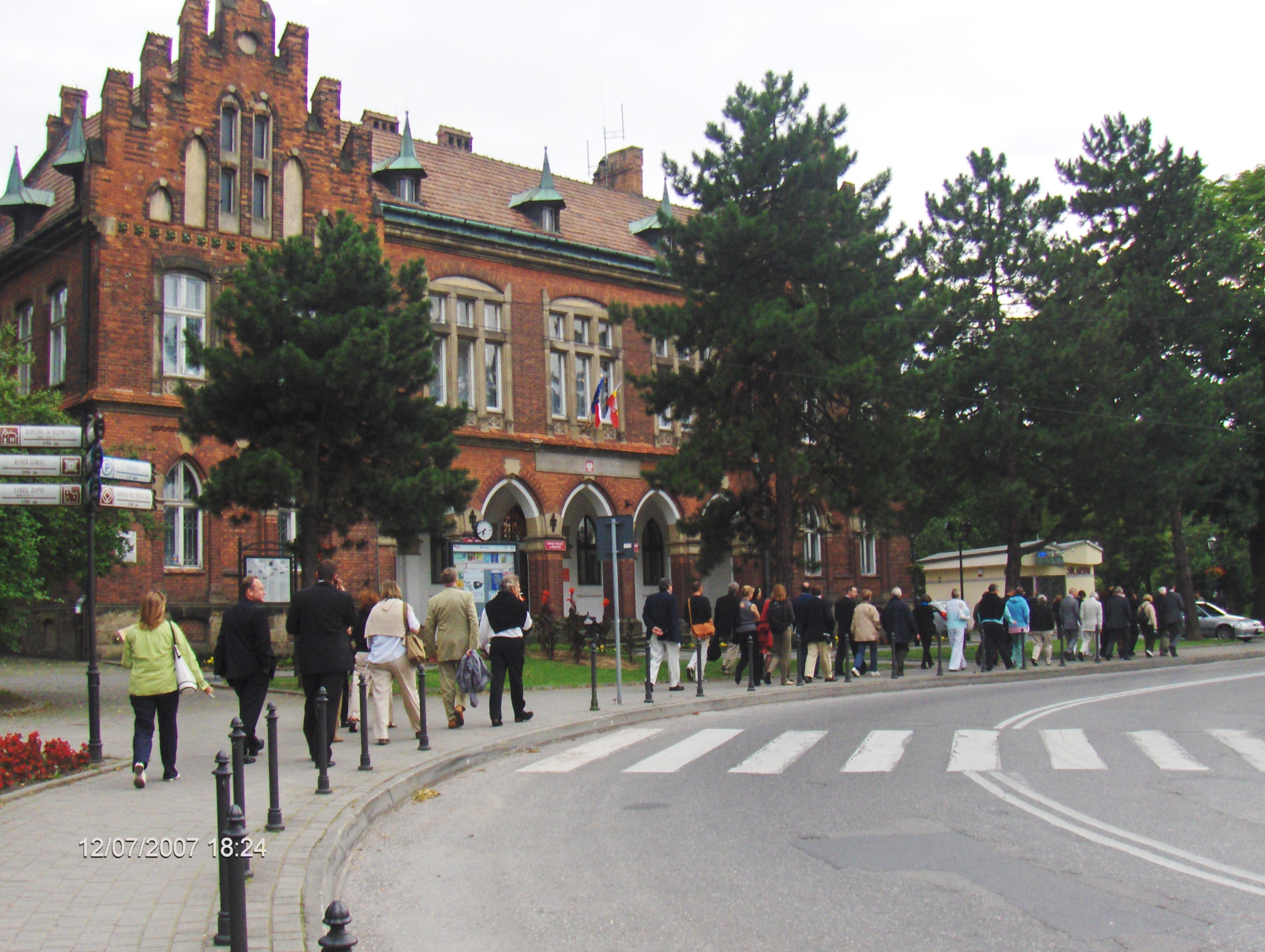 Wieliczka, ul. Dembowskiego 2 - dawna Szkoła Górnicza i Muzeum Salinarne (tzw. Sztygarówka), 1898 (zabytek nr A-576/M)